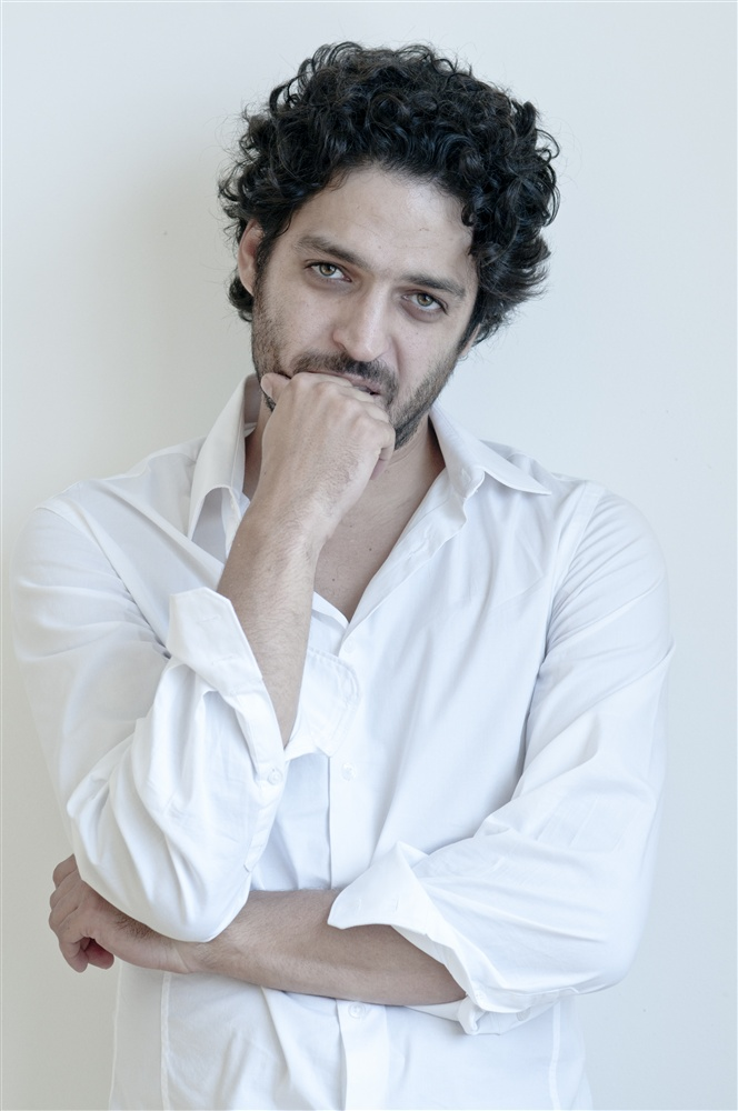 Younes Bouab